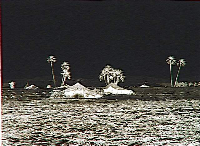 Biskra, camp nomade (Smalah de Cheik-El-Arab)